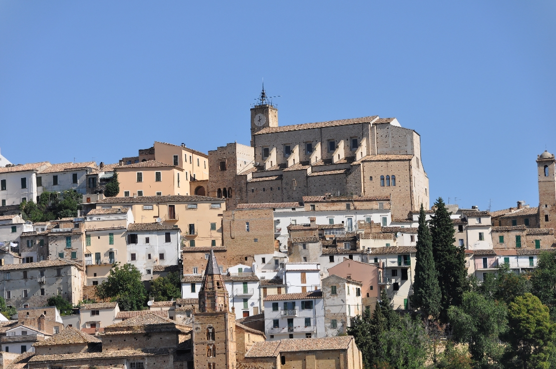 Loreto Aprutino 2012